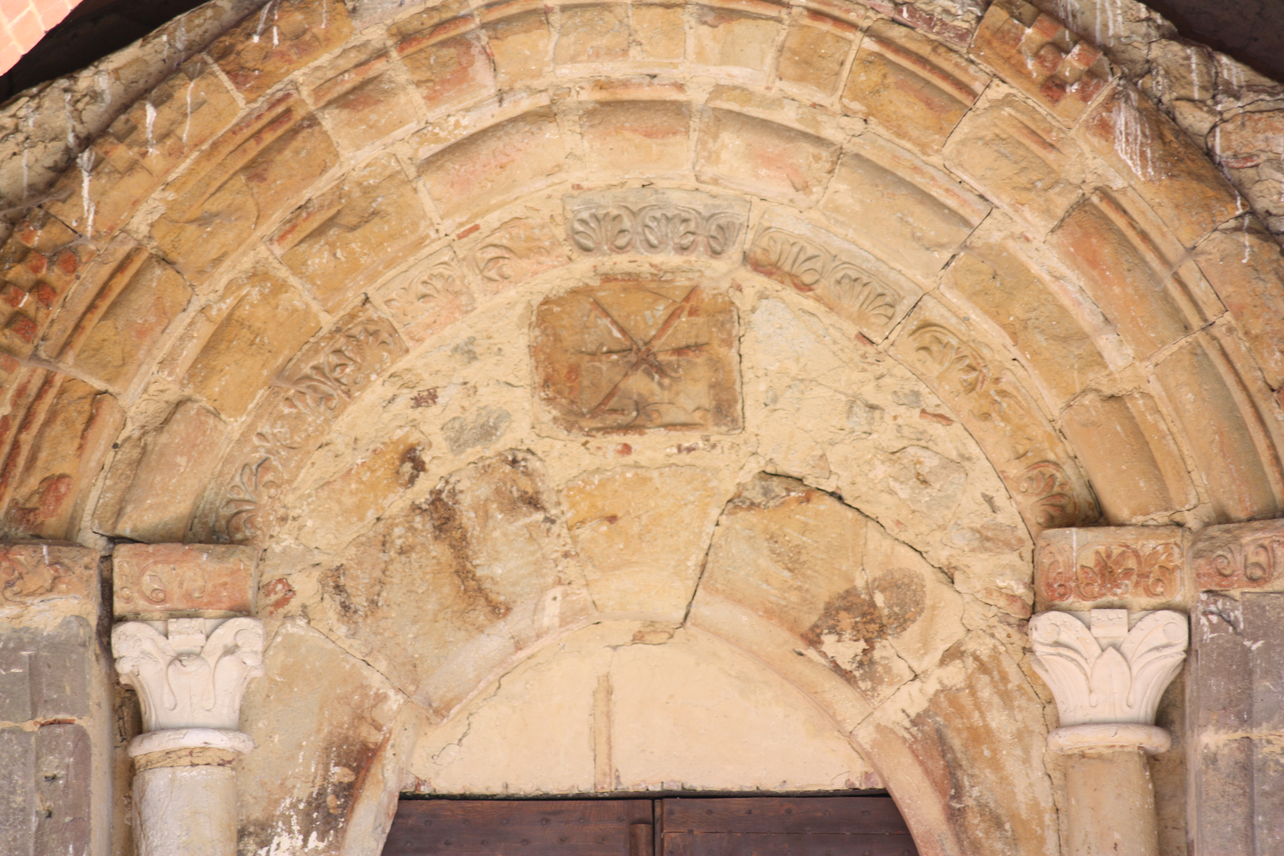 Luppé-Violles - Eglise Saint-Sauveur de Luppé